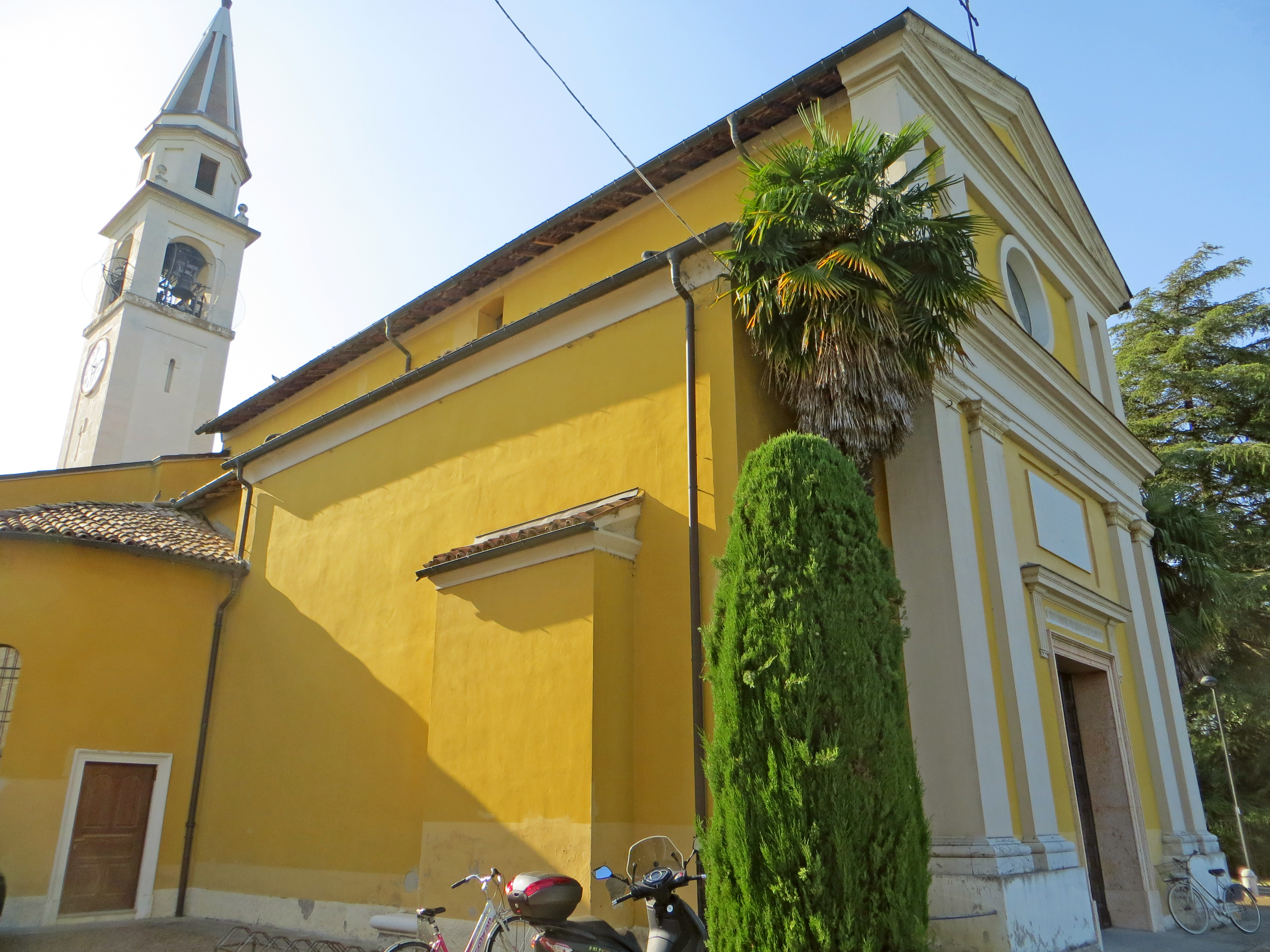 Chiesa dei Santi Stefano e Lorenzo (Sala Baganza) - facciata e lato sud